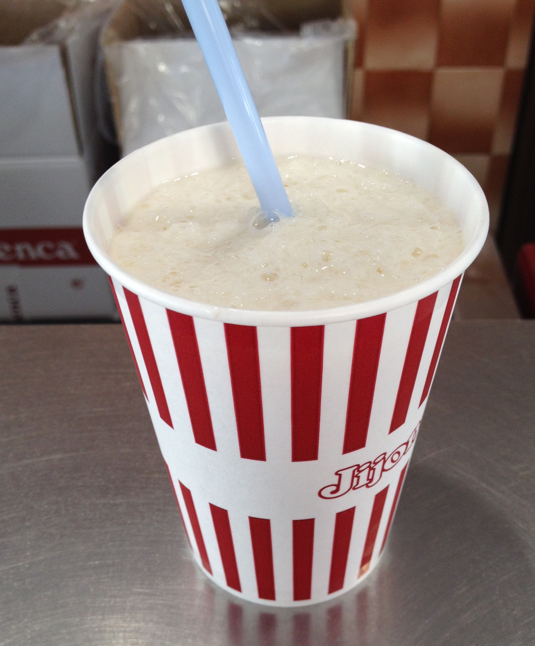 Fotografía de un vaso de granizado de leche rizada